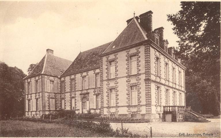 Château XVII e siècle